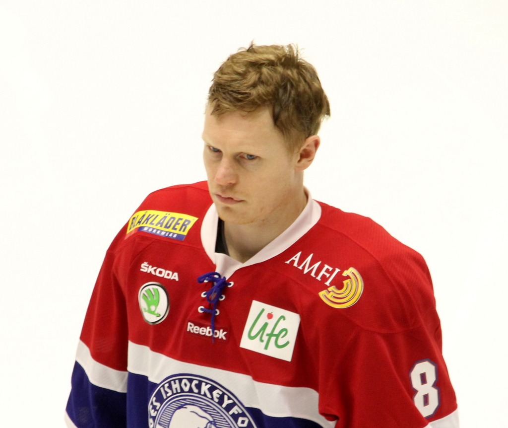 Mads Hansen i DNB Arena (Stavanger) i forbindelse med landskamp Norge- Russland 20.april. 2013.